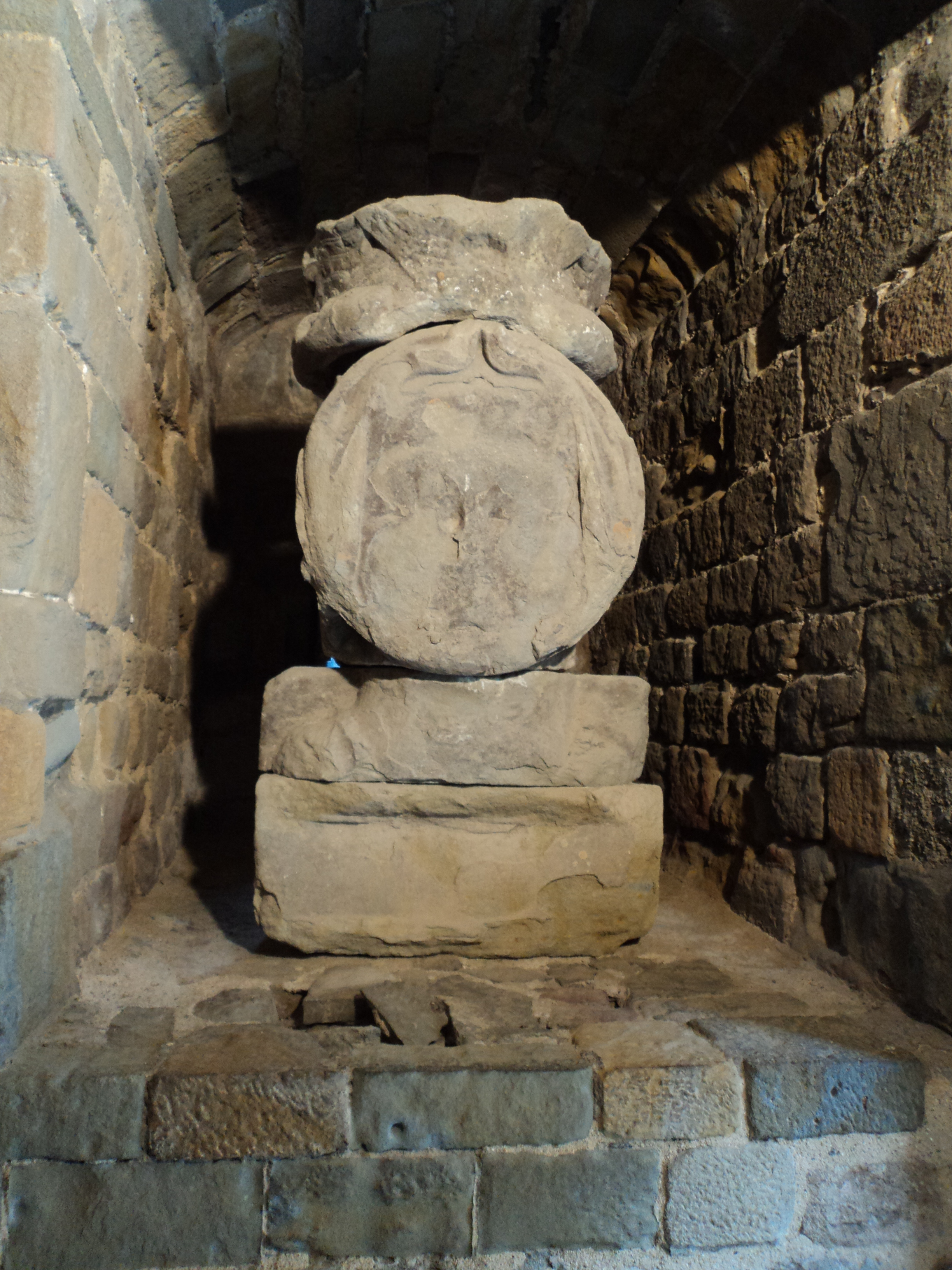 Escultura Original de la Dama de Carcas, Corroída por el paso de los años